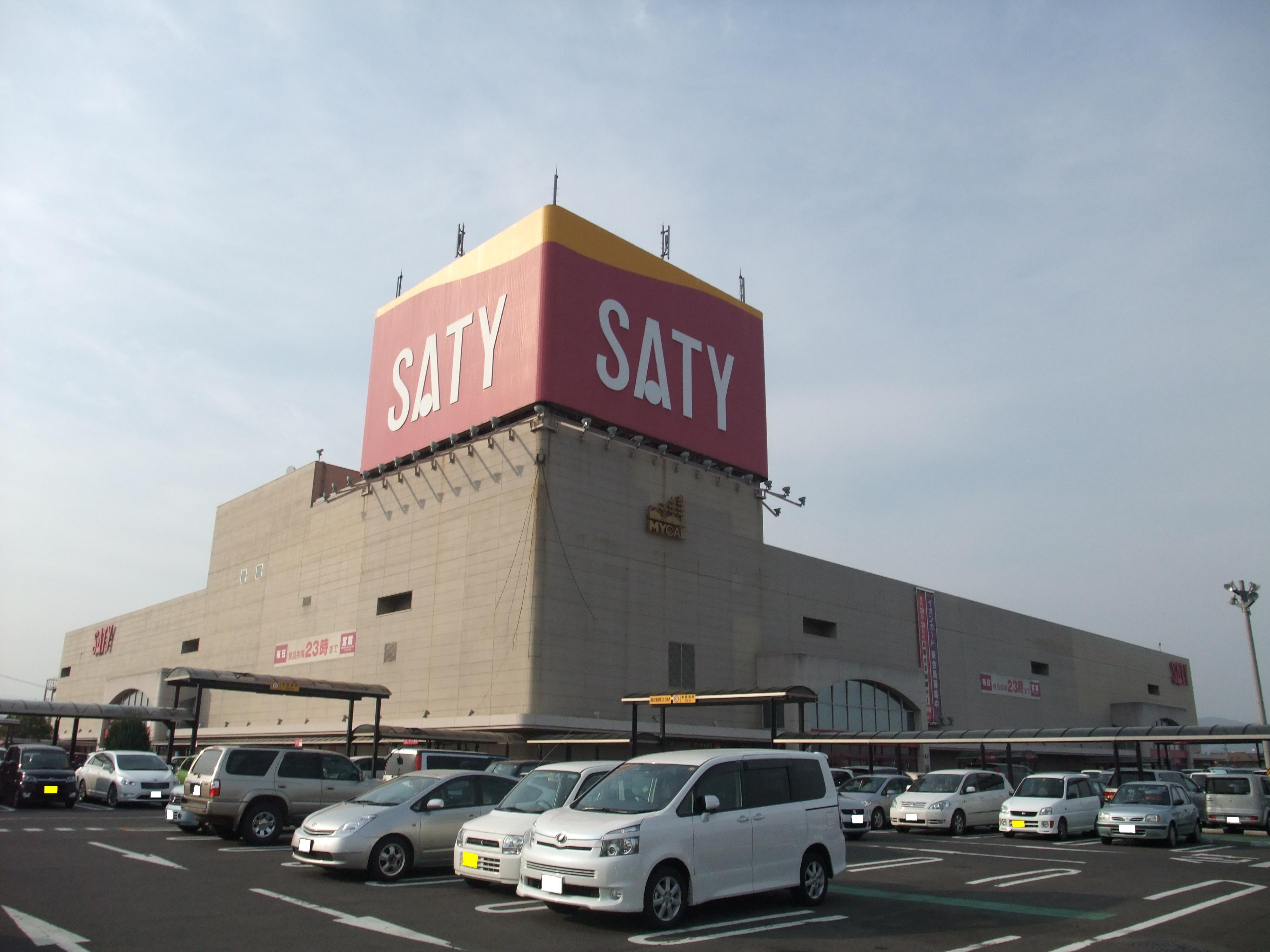 福島サティの外観